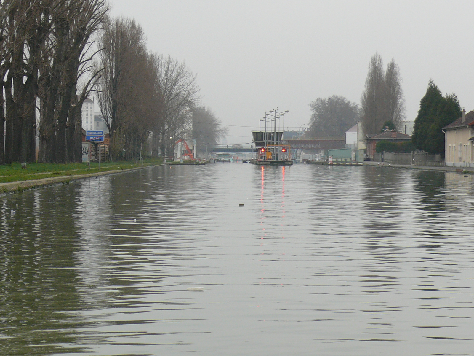 Le Canal Saint-Denis entre Paris et Aubervilliers, à proximité de l'écluse N°2 (Écluse des Quatre Chemins)